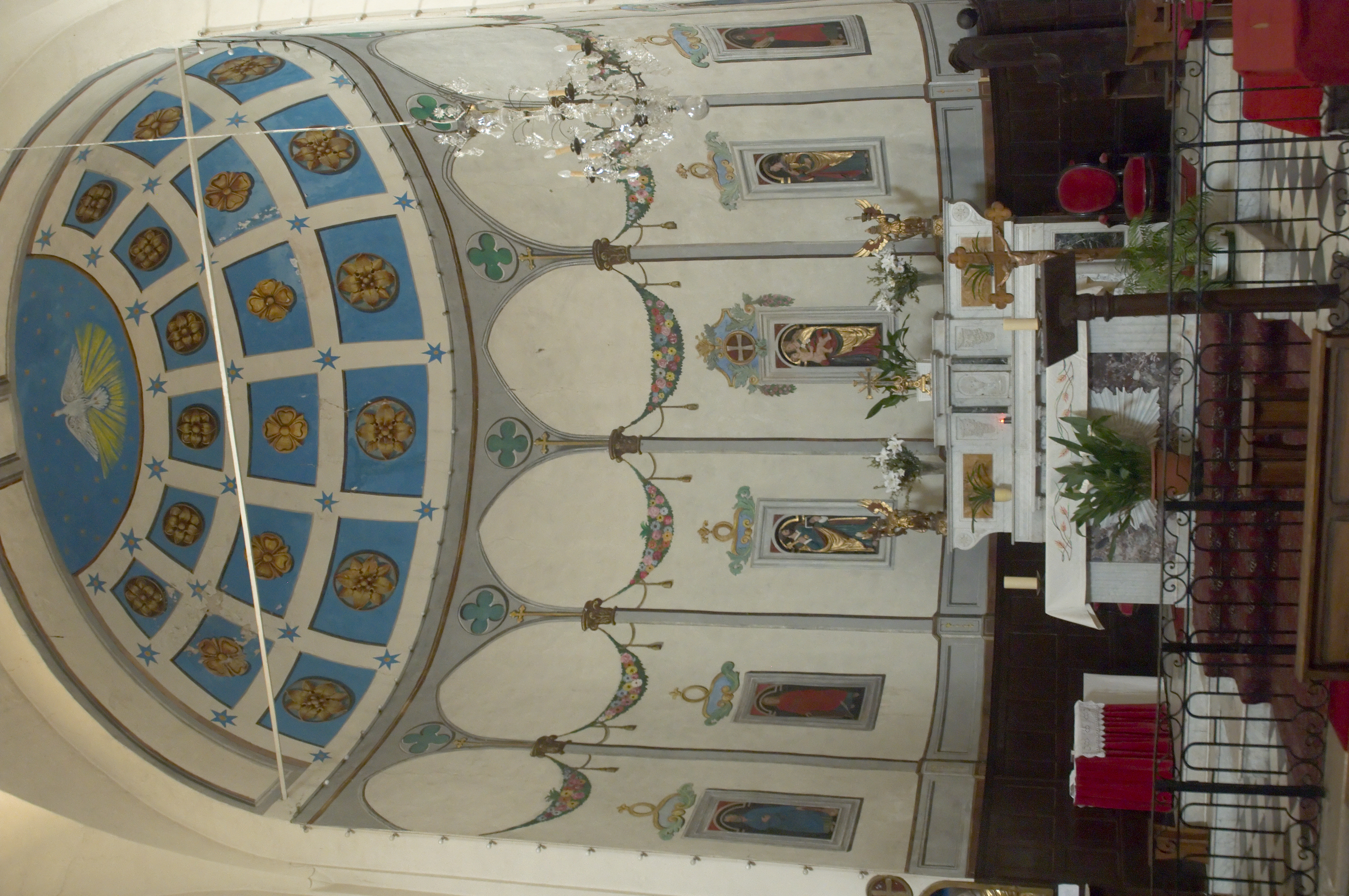 Auribeau-sur-Siagne - Église d'Auribeau-sur-Siagne - Autel